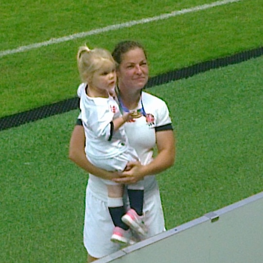 Emma Croker après la finale Angleterre-Canada du 17 août 2014 au stade Jean-Bouin